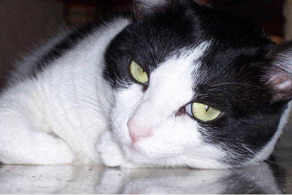 Gata europea bicolor, blanca y negra